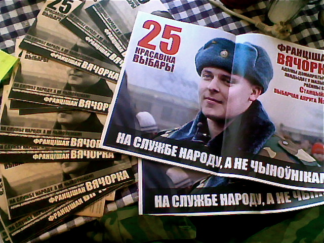 Беларуская (тарашкевіца): "Служу народу - а не чыноўнікам" - пад такім сьлёганам Франак Вячорка правёў выбарчую кампанію ў Мазыры